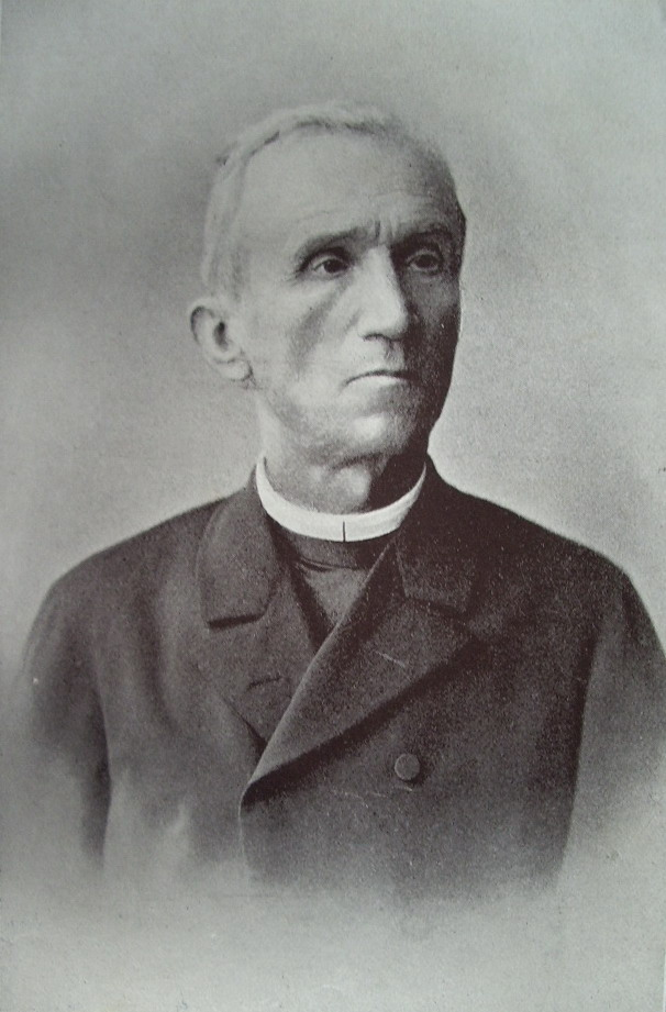 Torbar josip, hrvatski prirodoslovac, pedagog i političar